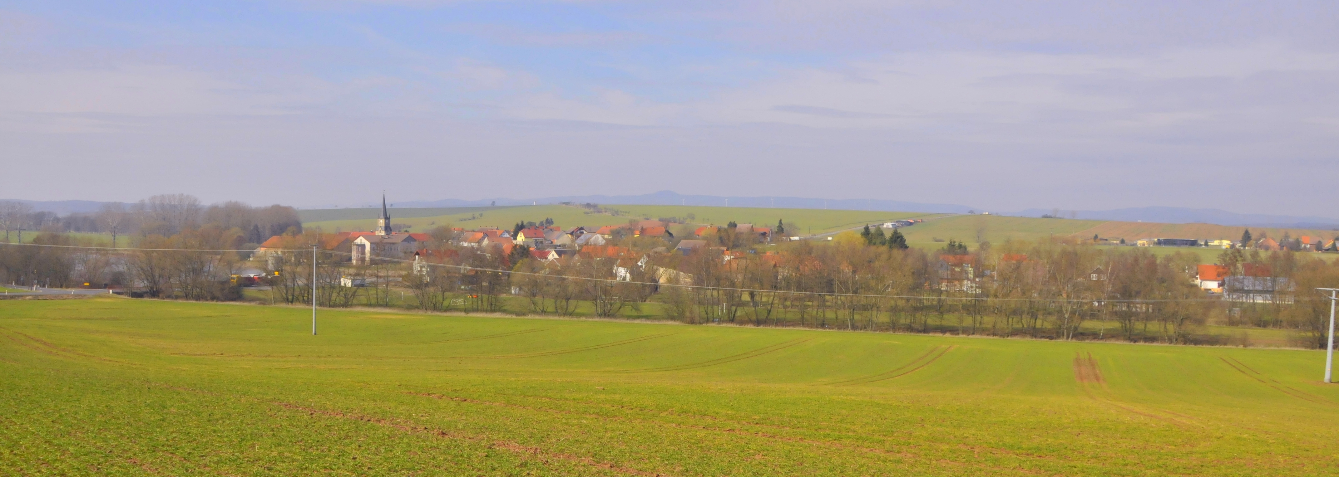 Schiedungen